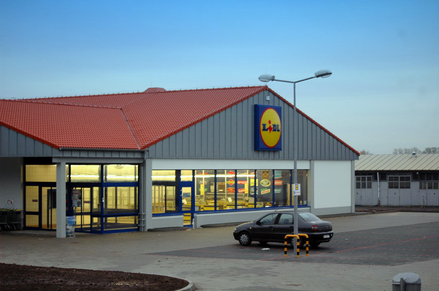 Lidl w Kamieniu Pomorskim